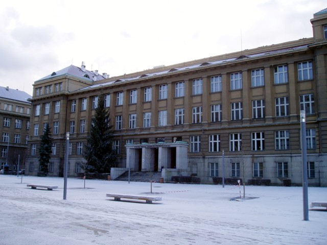 VŠCHT